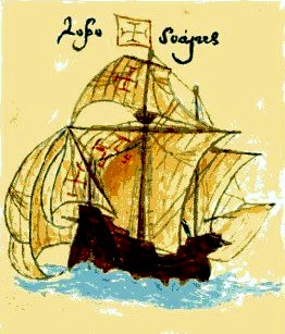 Каравелла португальского мореплавателя Лопо Соареша, копия рисунка 16 века.